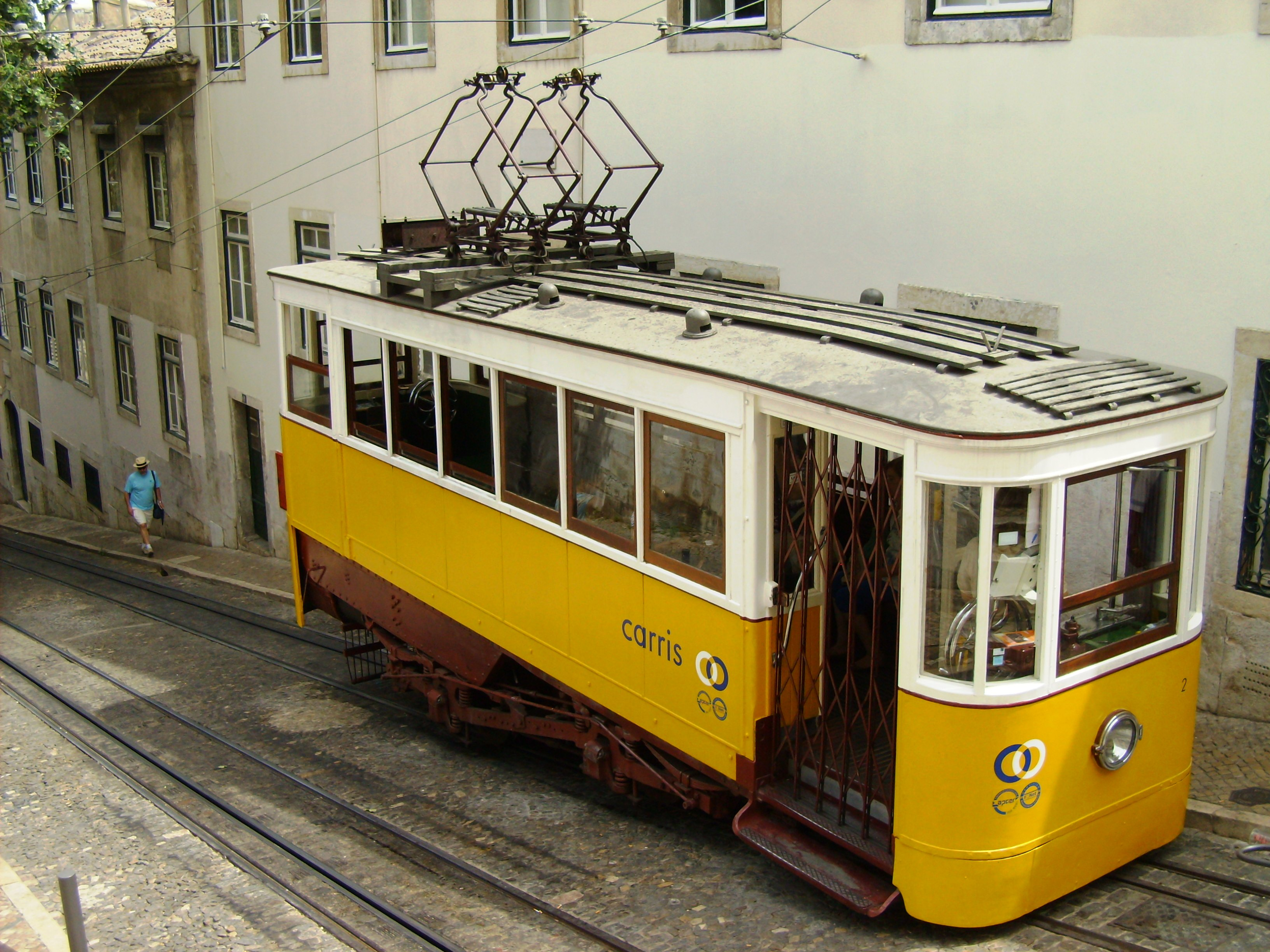 Elevador da Glória, Bairro Alto, cidade e distrito de Lisboa, Portugal